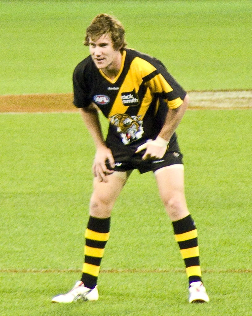 Richmond vs Essendon warm up MCG